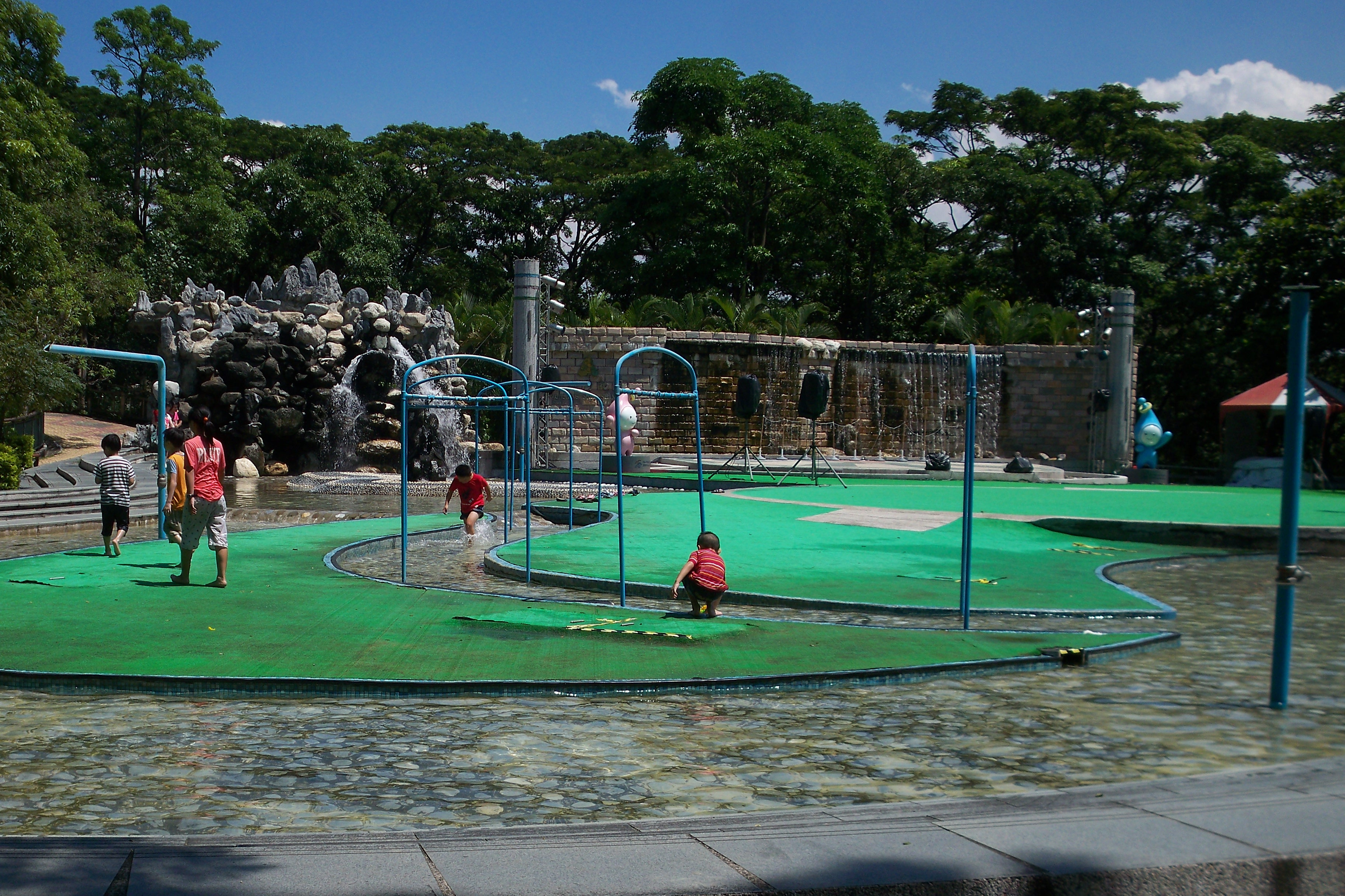 高雄市壽山動物園 戲水區